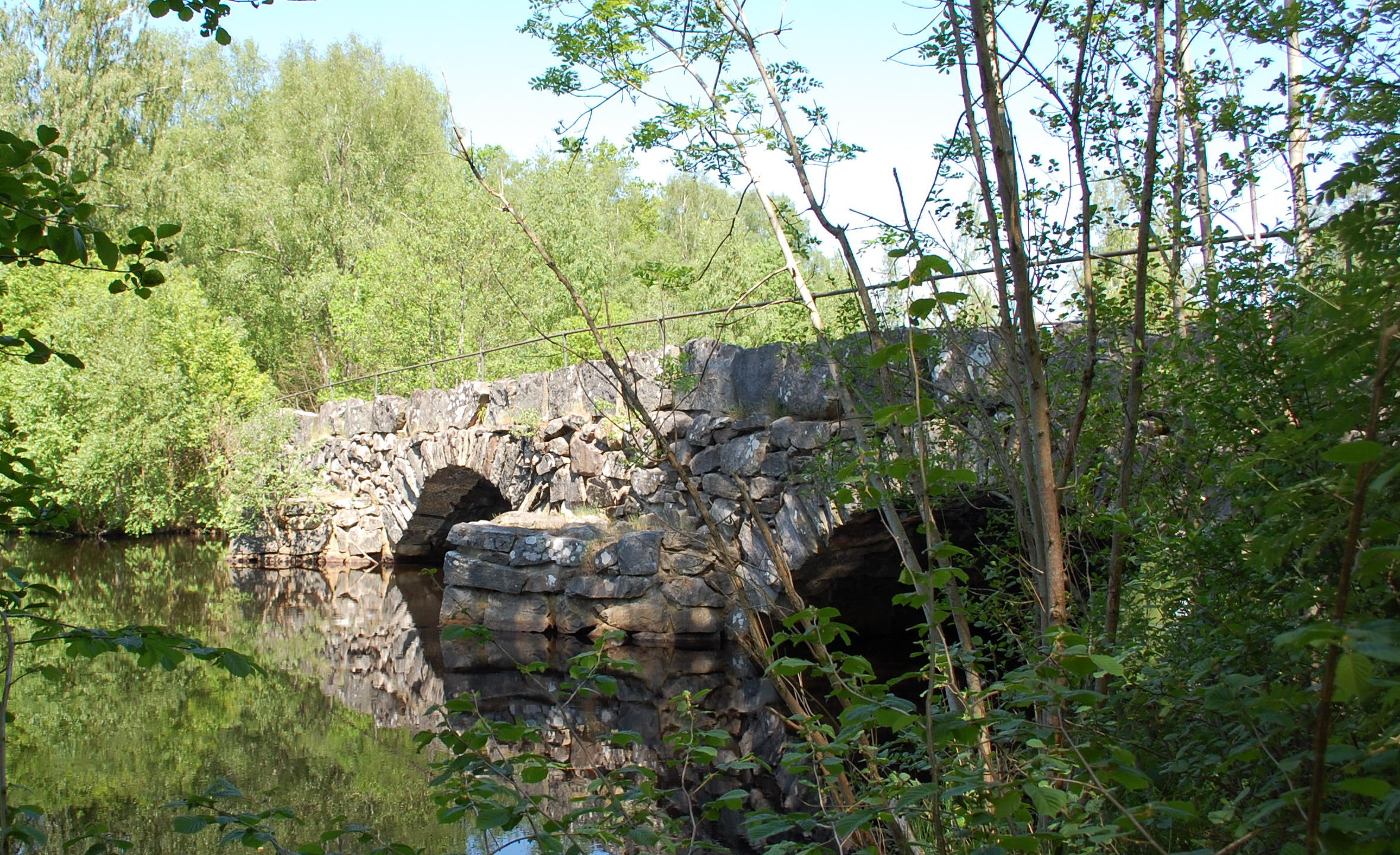 Steinbogebrücke in Glimminge